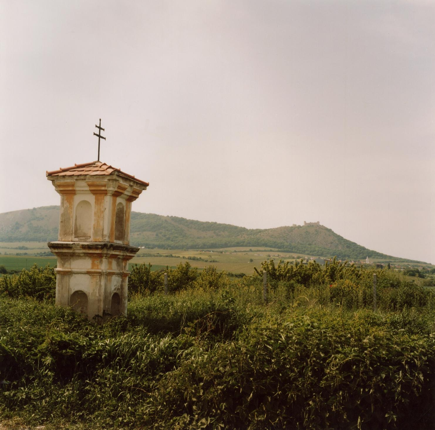 Bildstock bei Pavlov u Dolních Věstonic (Südmähren).